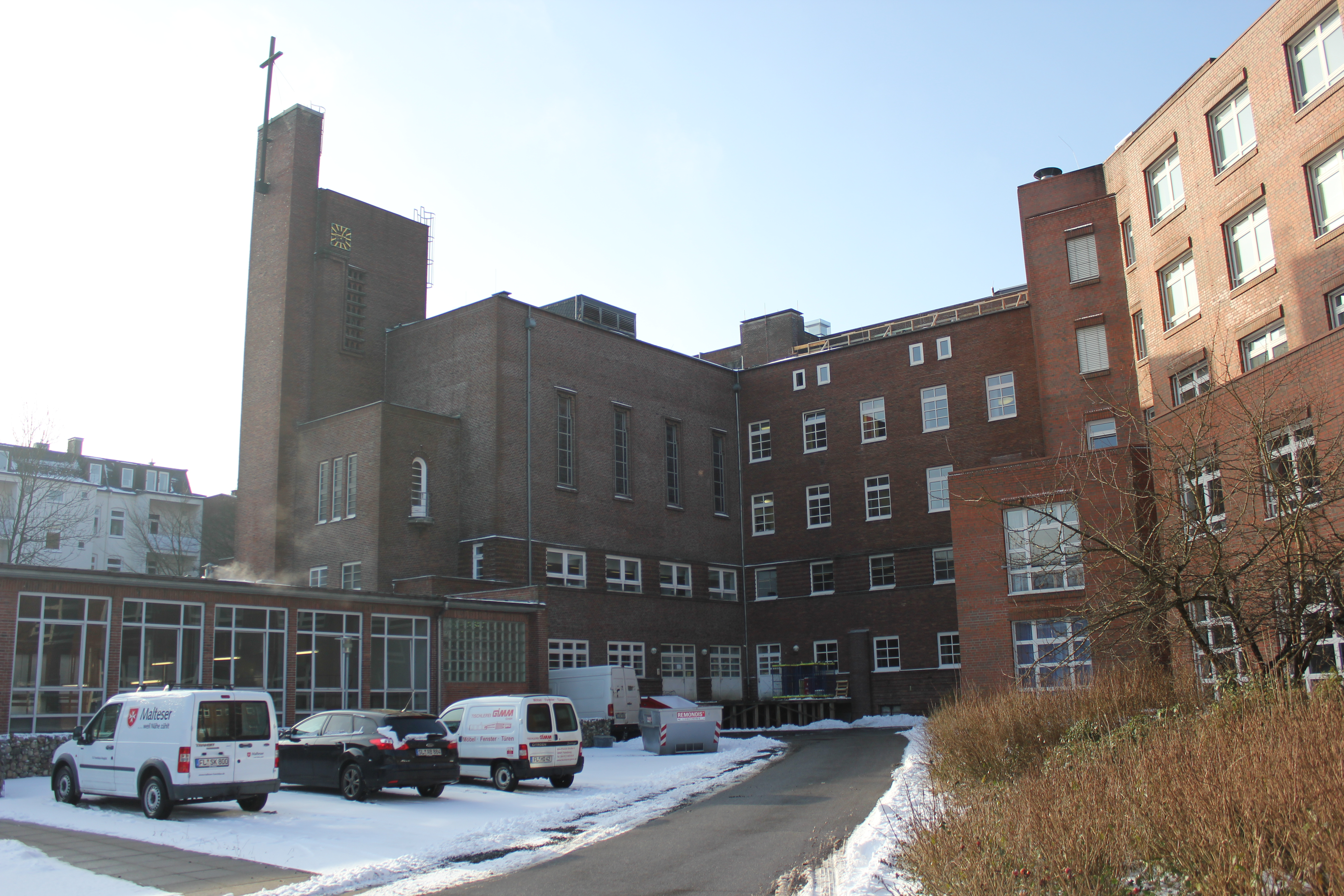 Franziskus-Kapelle im Schnee (Flensburg 2014)